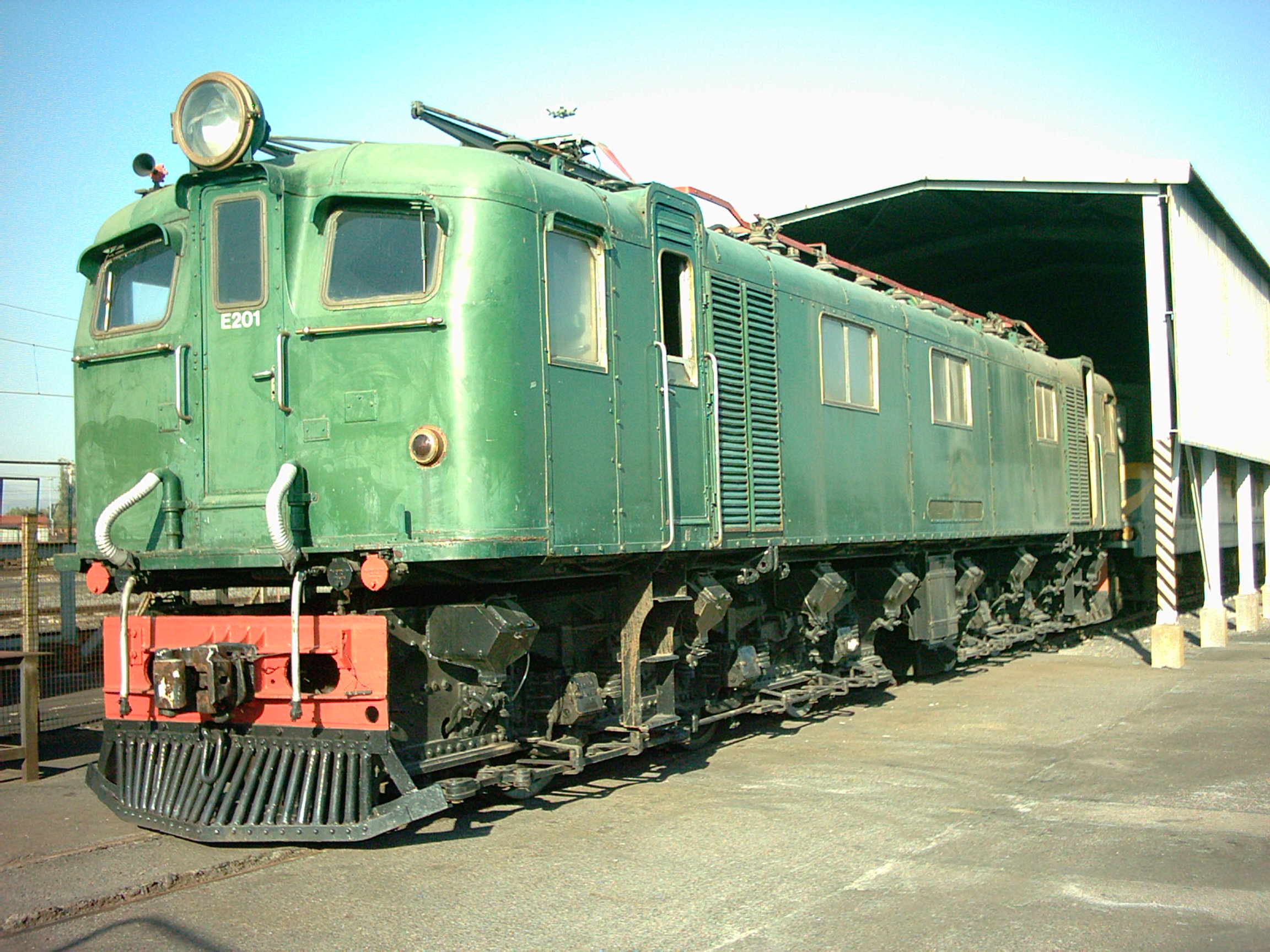 Class 3E no. E201 at Bellville Loco